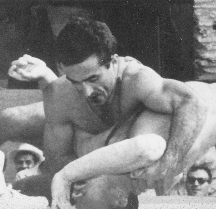 Garibaldo Nizzola vs Kazuo Abe, 1960 Olympics